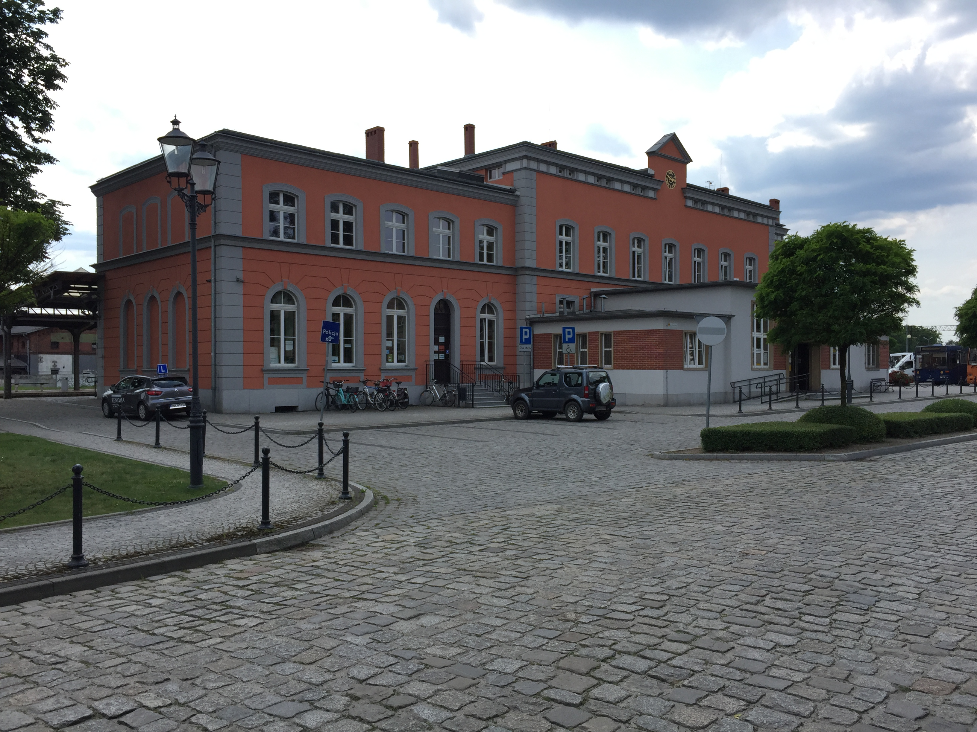 Zabytkowy dworzec kolejowy w Namysłowie